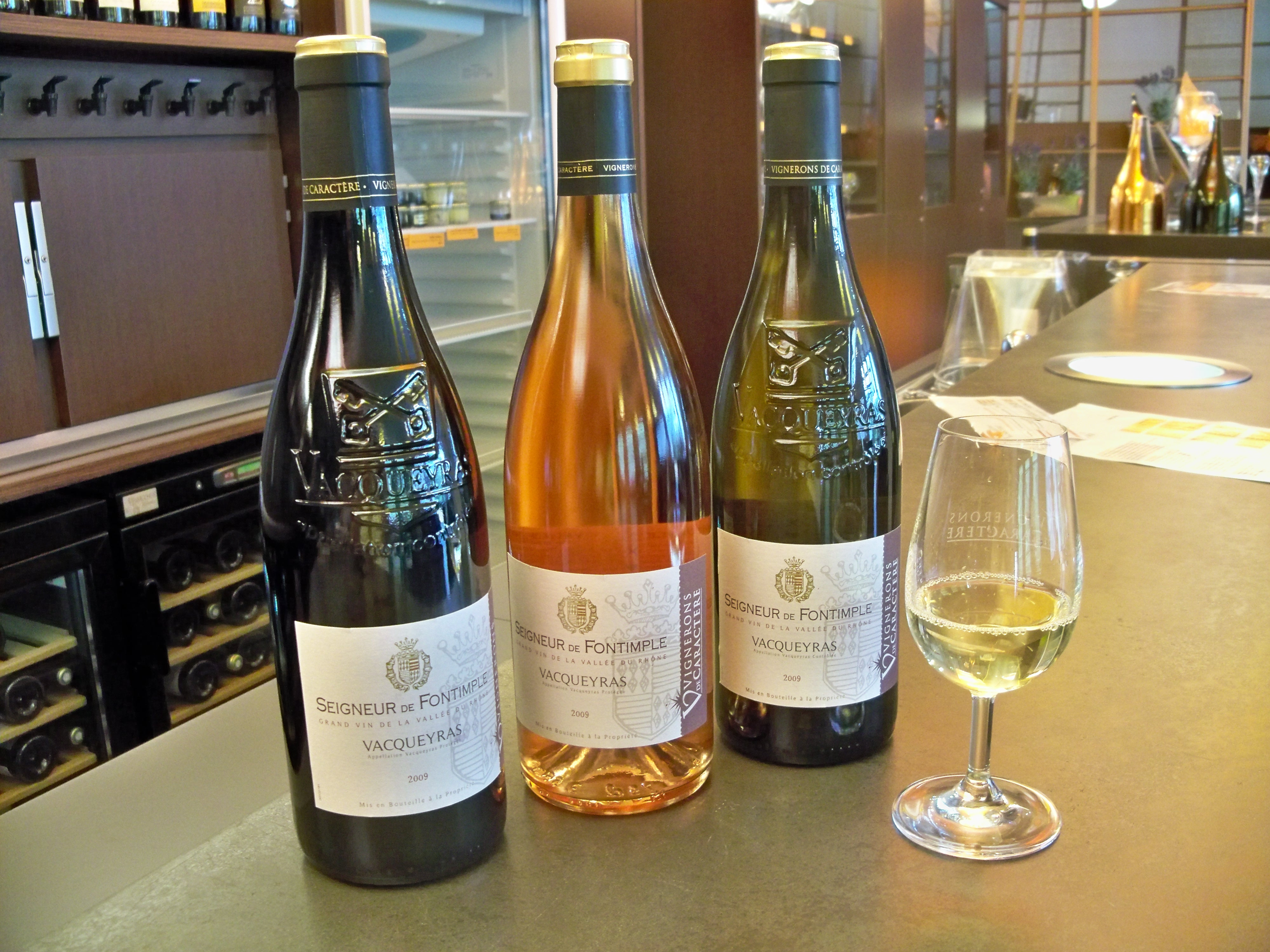 Gamme de Vacqueyras AOC